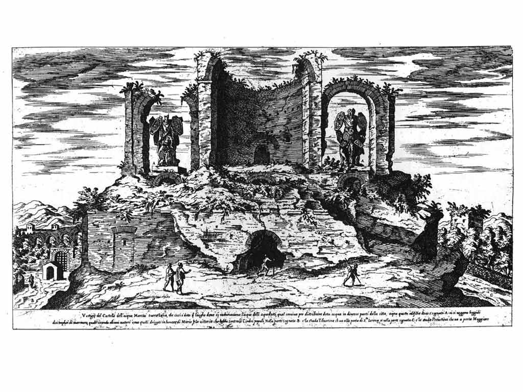 Trofei di Mario